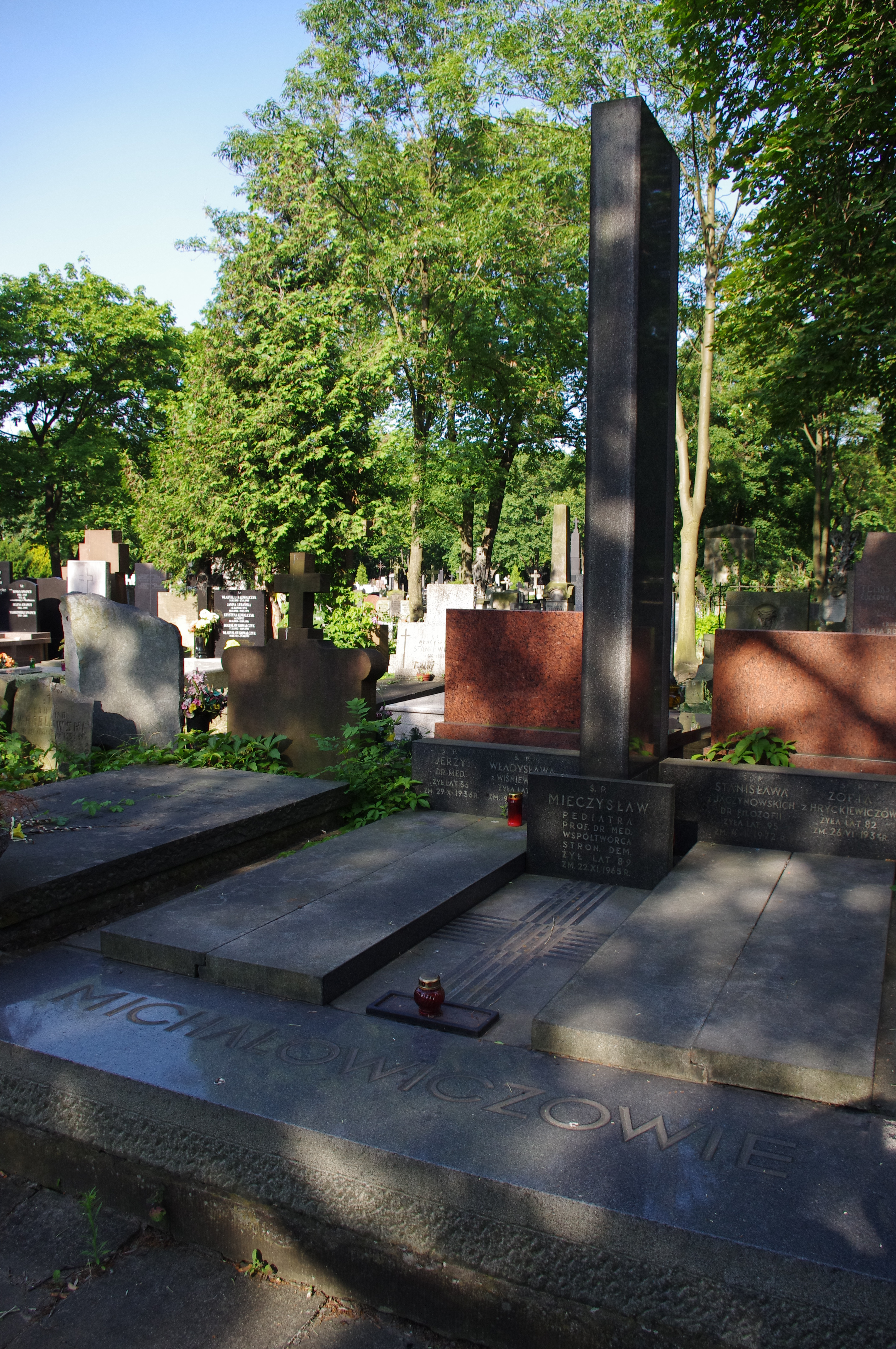 Grób lekarza Mieczysława Michałowicza na Starych Powązkach w Warszawie